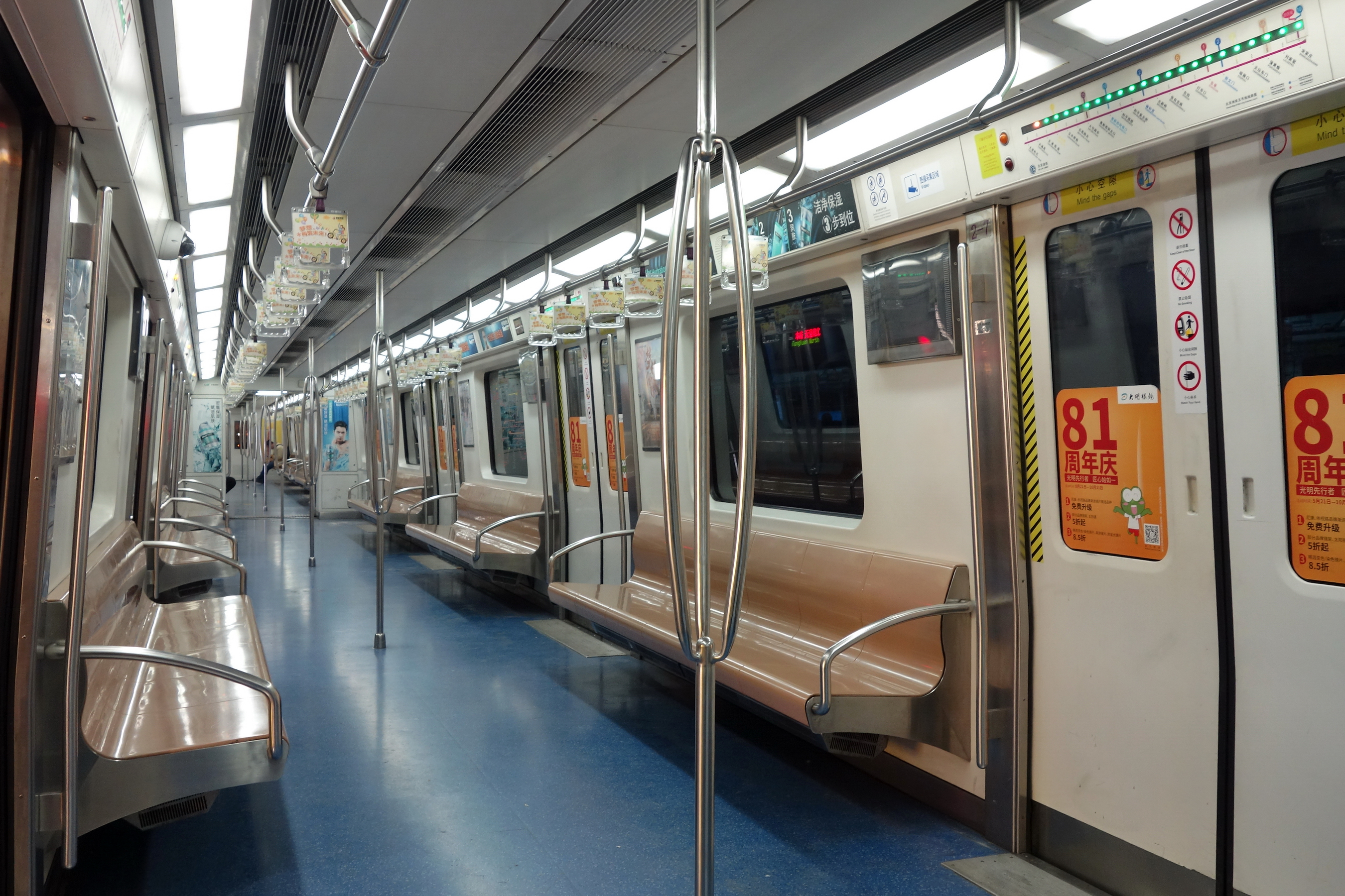 北京地铁5号线列车内部